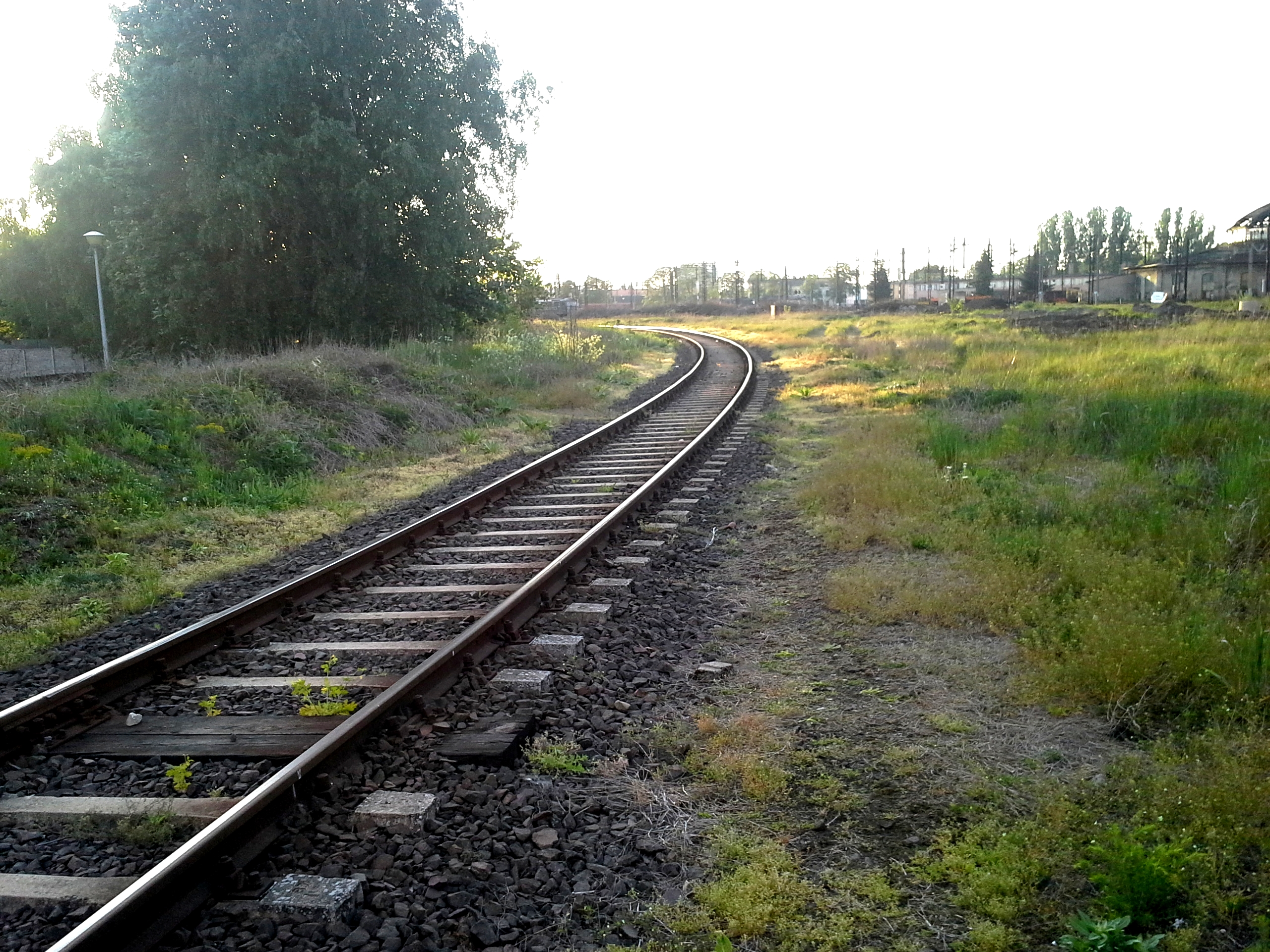 Linia kolejowa nr 374 odbija od stacji Piła Główna.